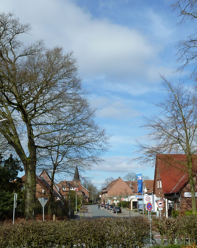 Blick von Ostern auf die Buchentorstraße in Kattenvenne